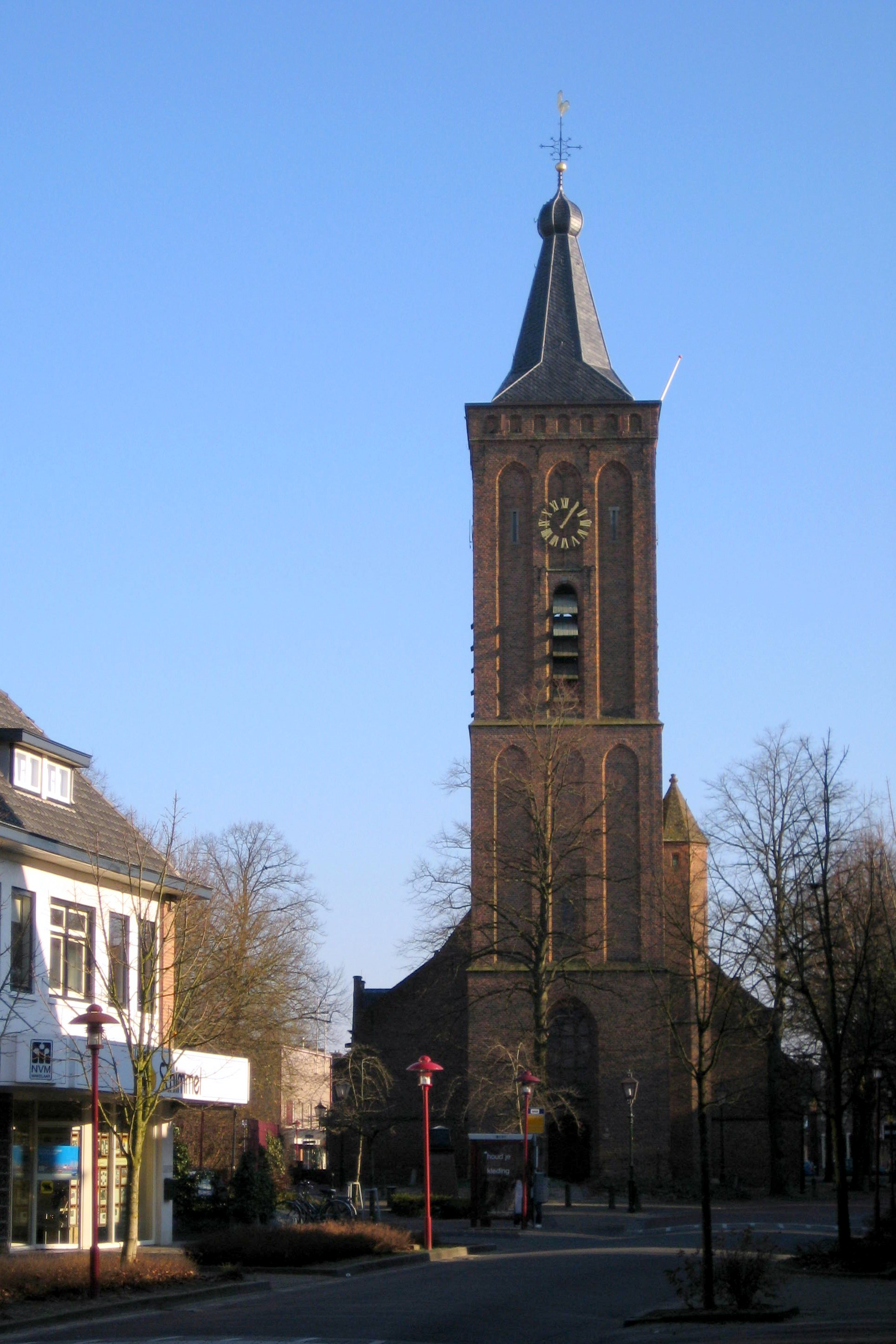 Reformed Church (Hervormde Kerk) in Scherpenzeel, the Netherlands.